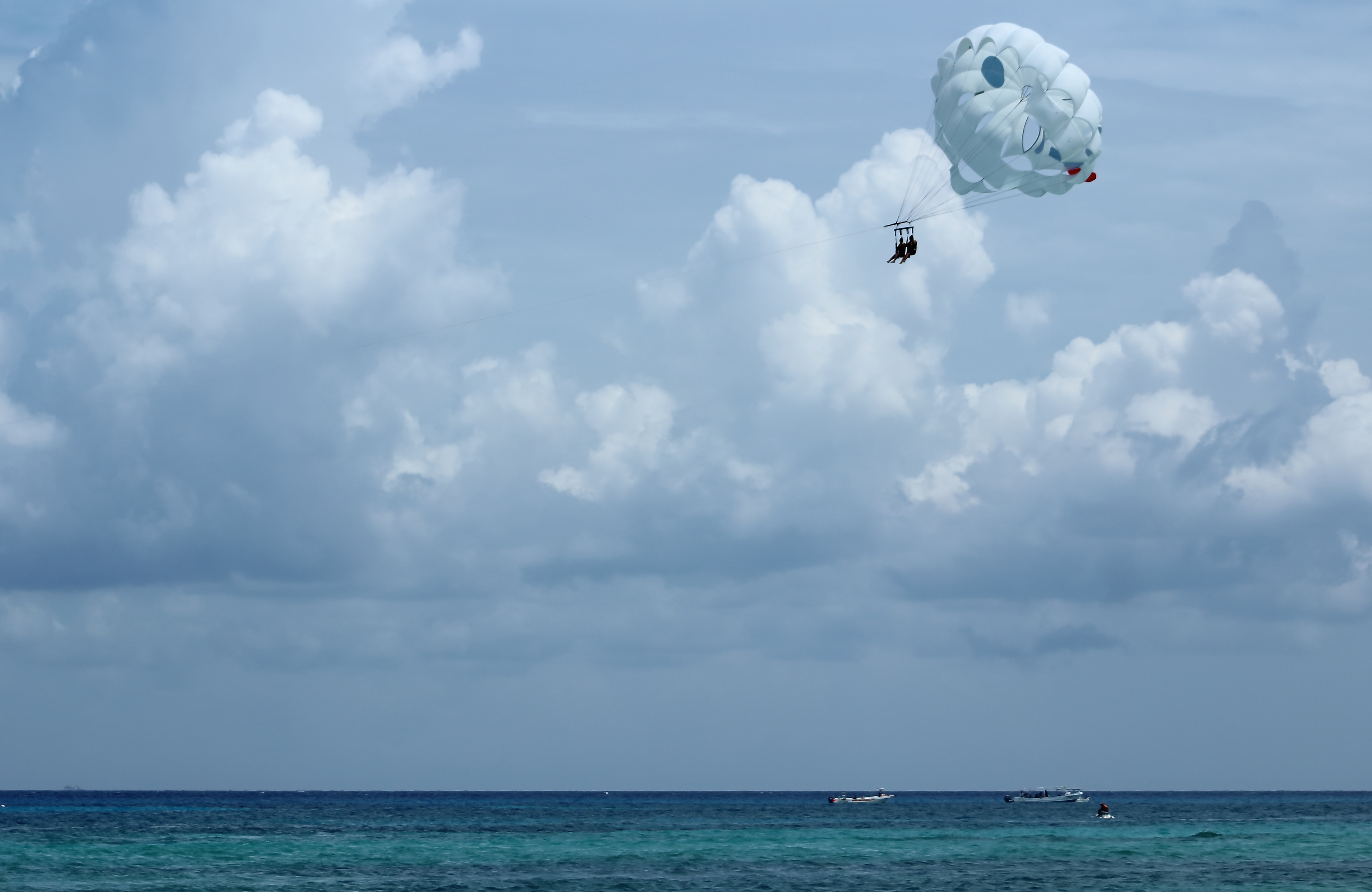 Parasailing en Playa del Carmen, Quintana Roo, México.